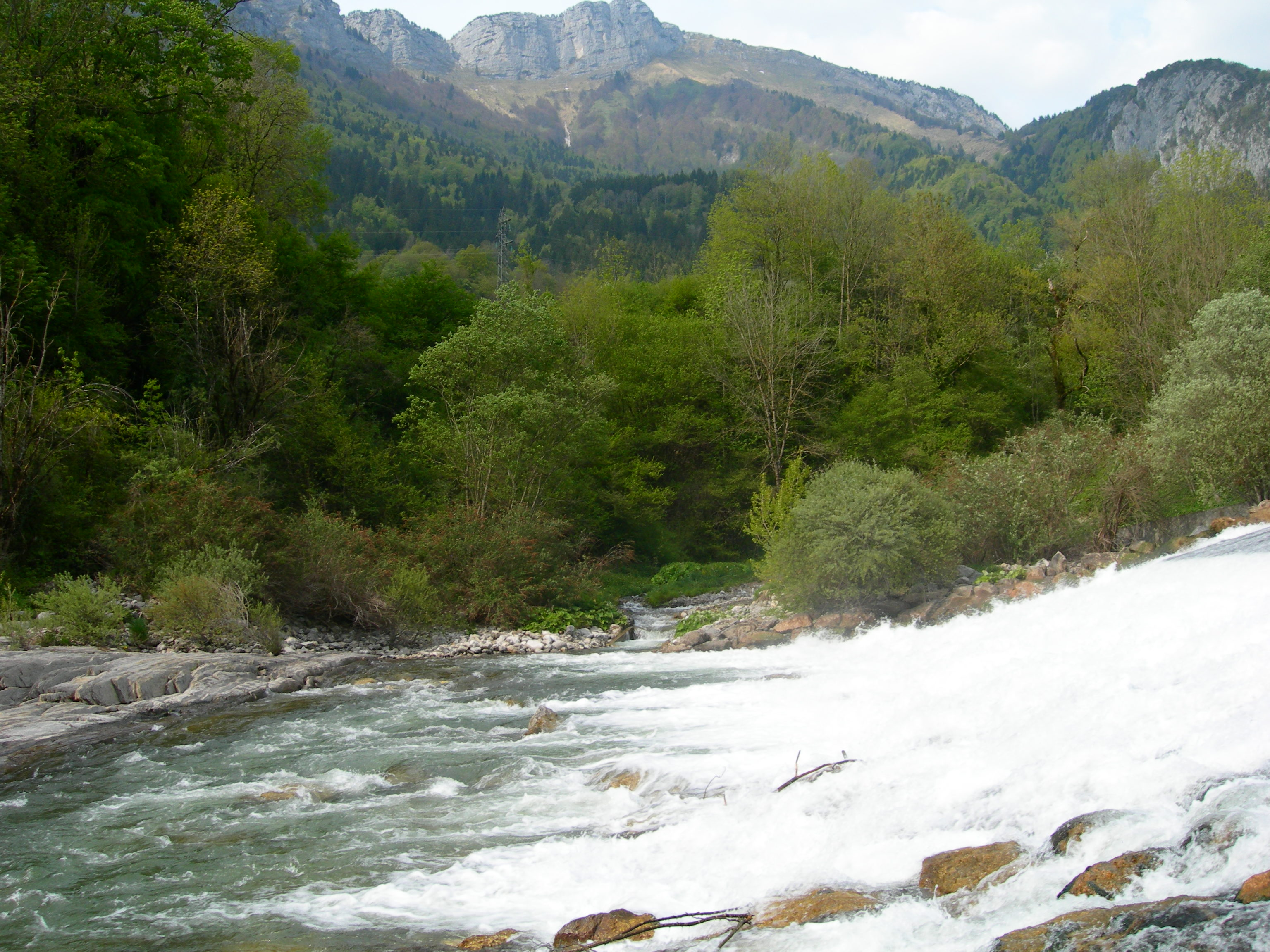 Le Fier, quelque part dans la plaine d'Alex...